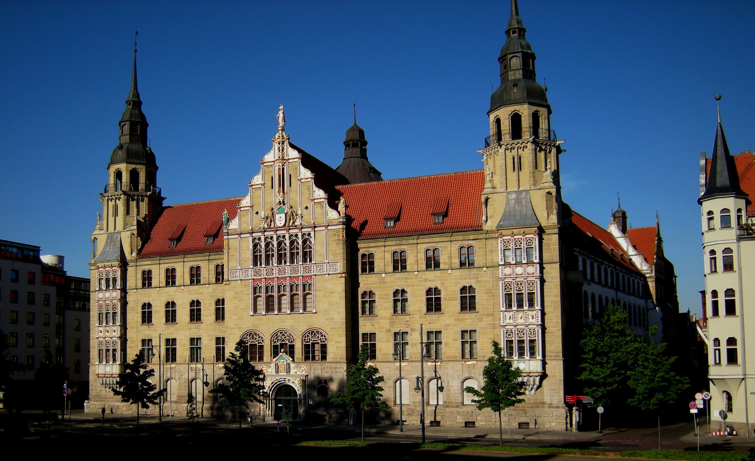 Gebäude des Landgerichts Halle in Halle (Saale), Sachsen-Anhalt; erbaut 1903–1905; unter Denkmalschutz